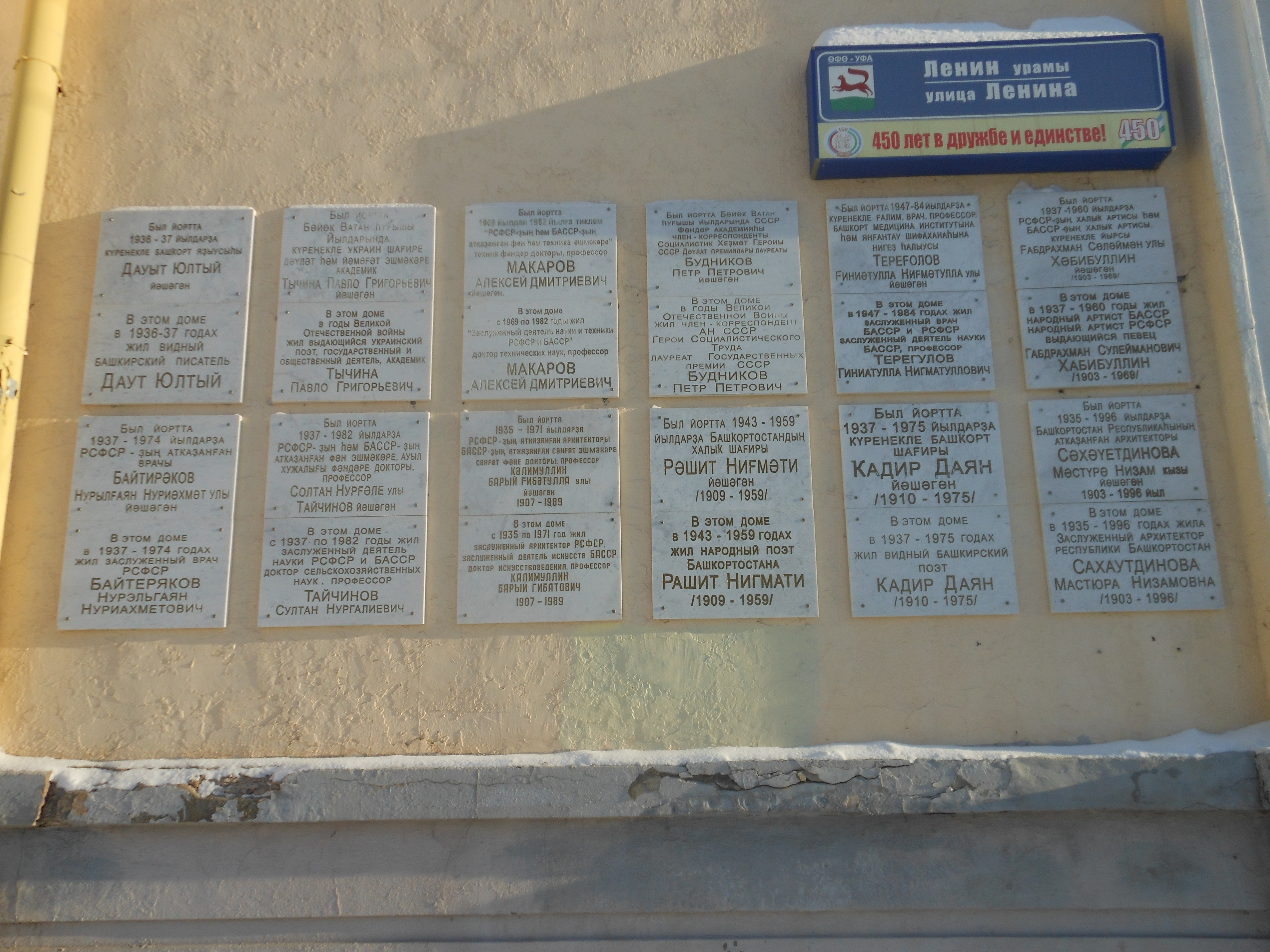 декабрь, 2013 год